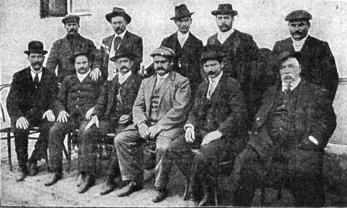 Grito de Alcorta (1912, prov. de Santa Fe, Argentina).